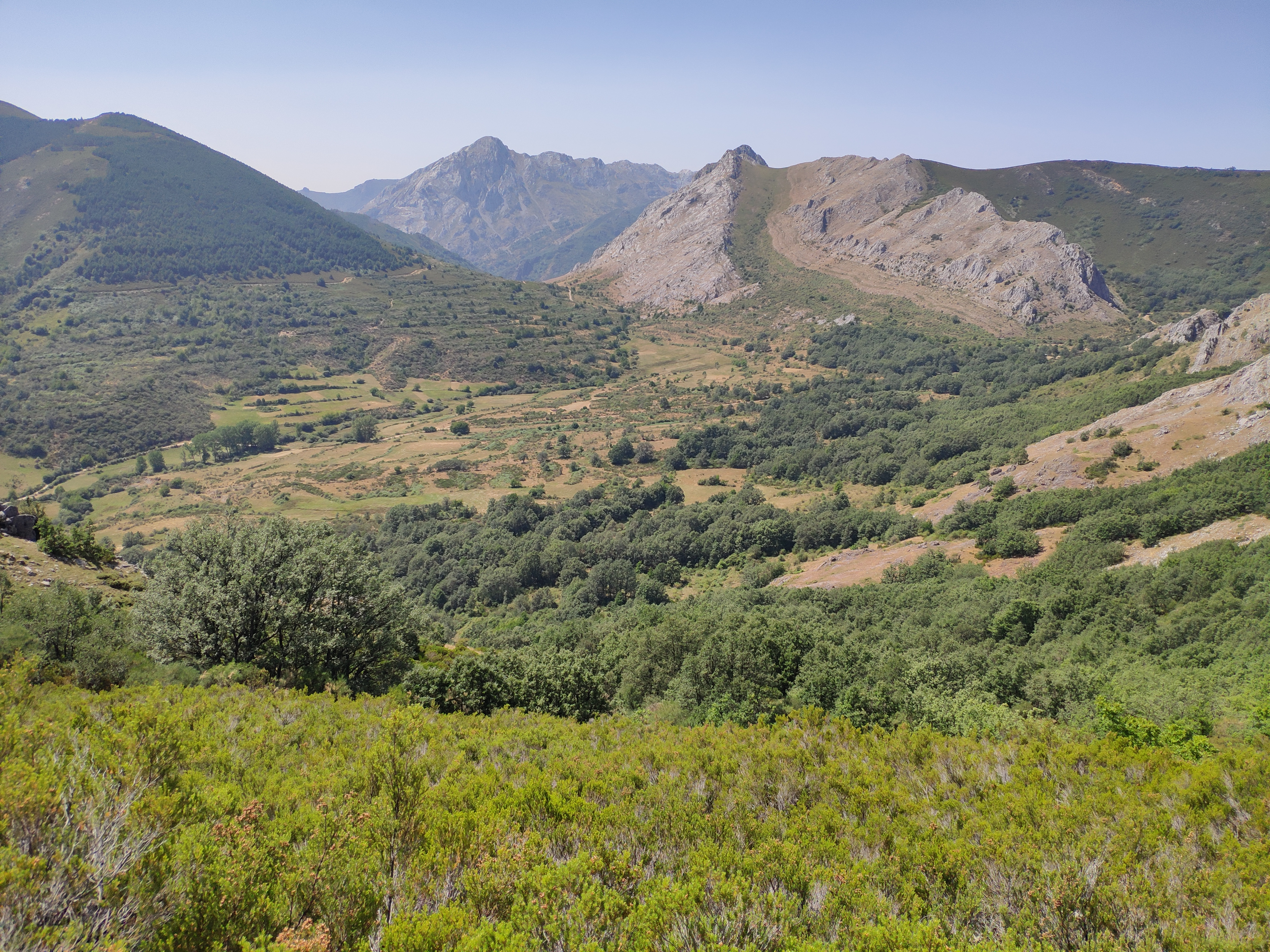 Valle de Oville